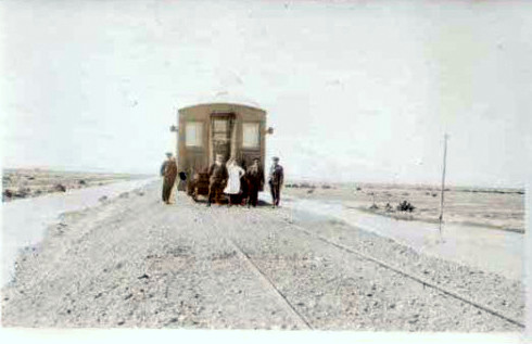 Tren detenido en proximidades a la estación Valle Hermos